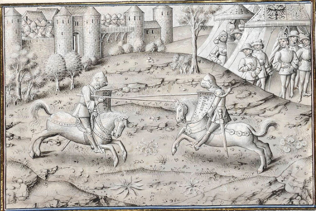 Souboj Rolanda s Olivierem v eposu Girart de Vienne (chanson de geste